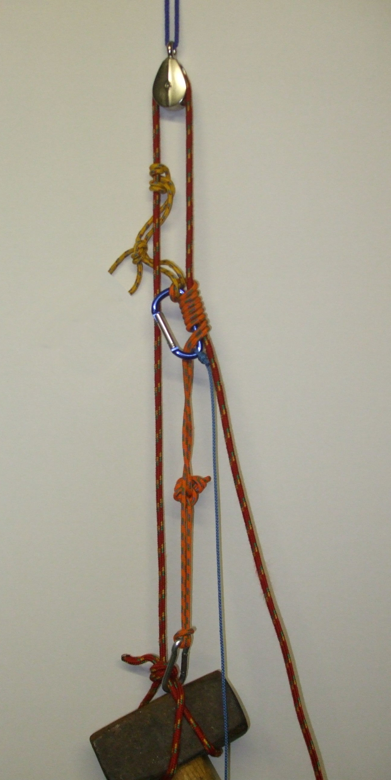 selbstverriegelnder Seilzug mittels Bachmannklemmknoten, Seilrolle und Prusiklift Verwendung zum gesicherten Seilaufstieg beim Kletteren und Lastabsenkung bei Baumkletterern/ Seilunterstützten Klettertechnik